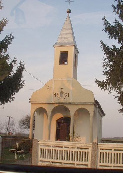 kapelica u Poljanskom Lugu